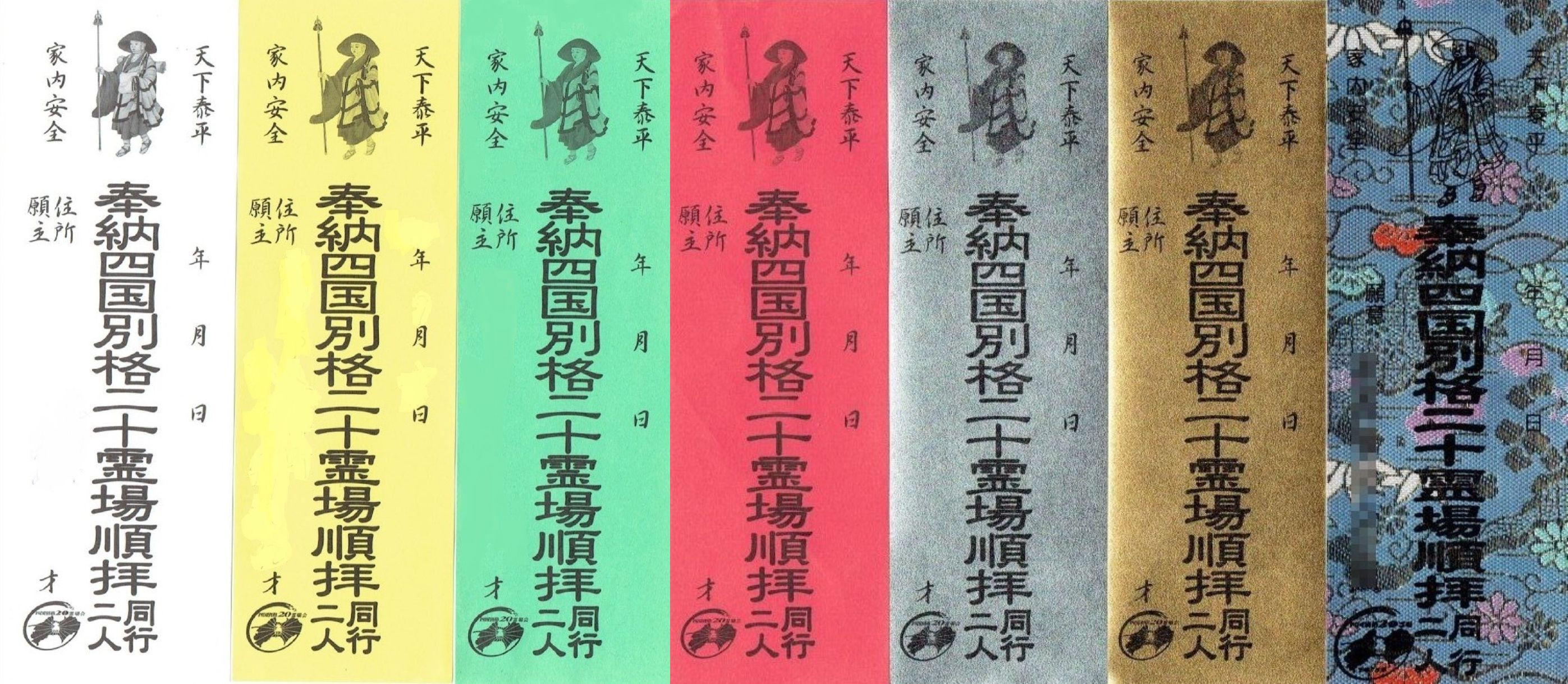 四国別格二十霊場の納札